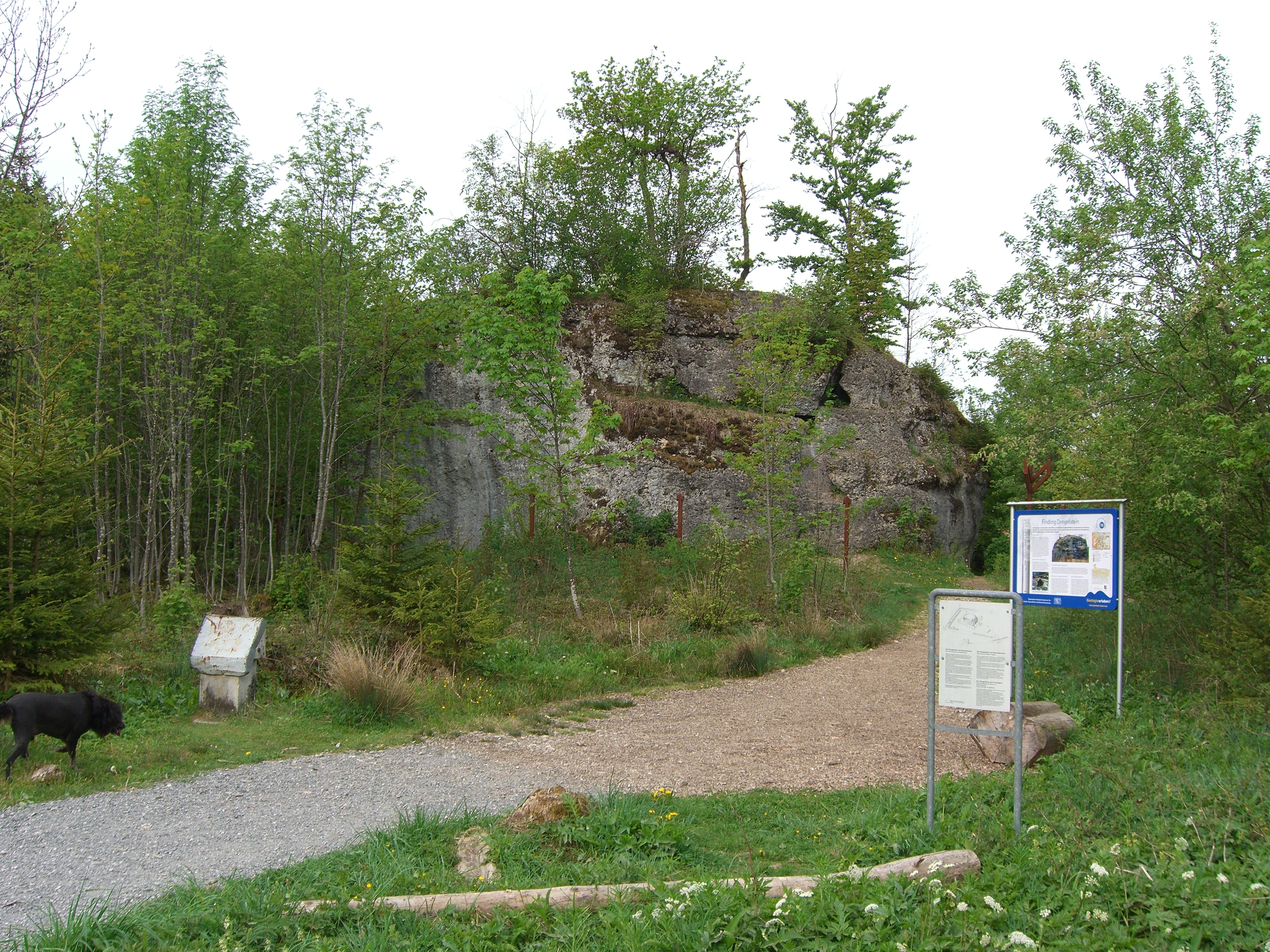 Ein Foto vom Dengelstein (Findling)